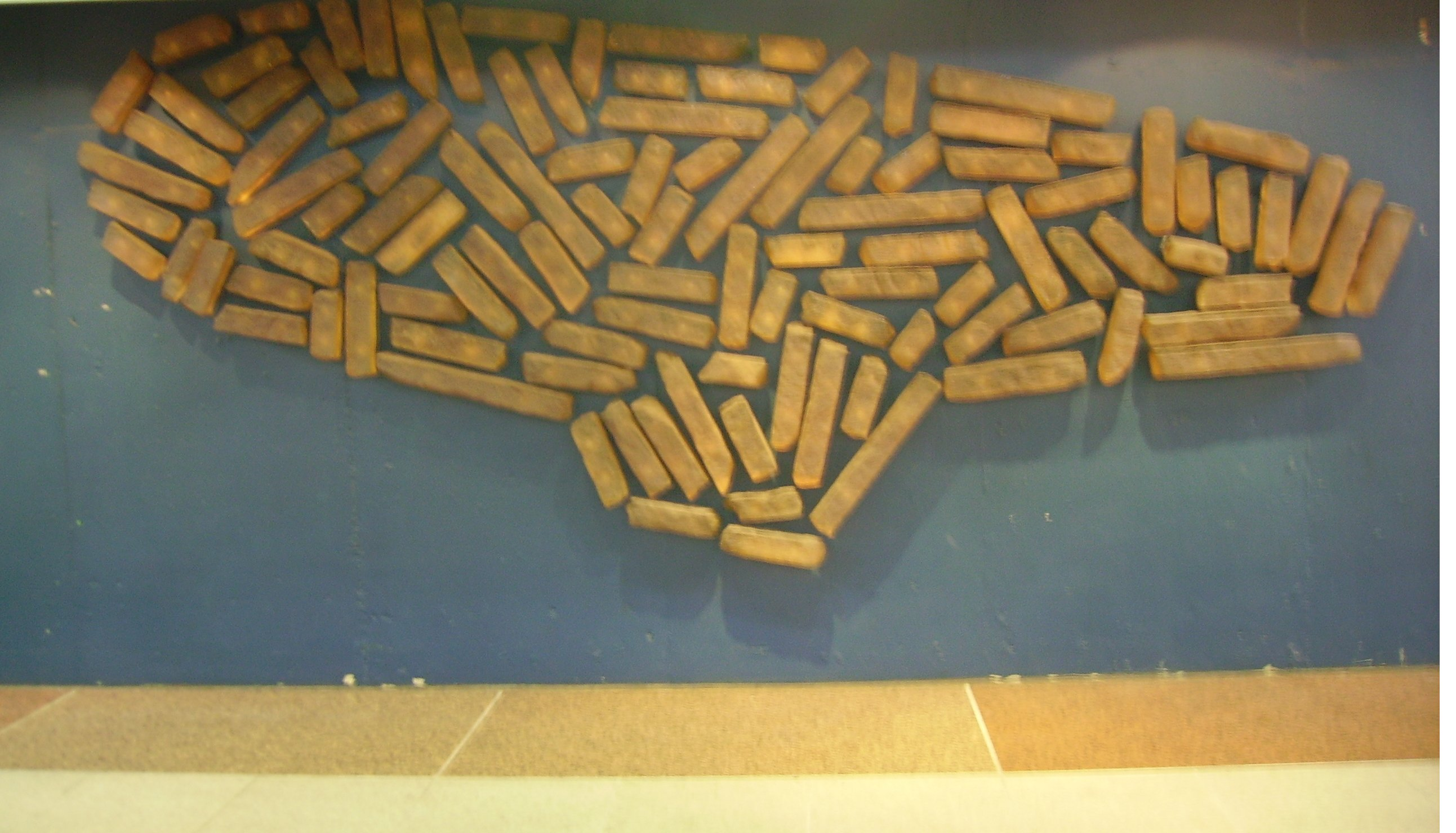 2000年，使用臺北城舊有石材作成，狀似臺灣的現代藝術品。位於臺北市站前地下街穿堂。